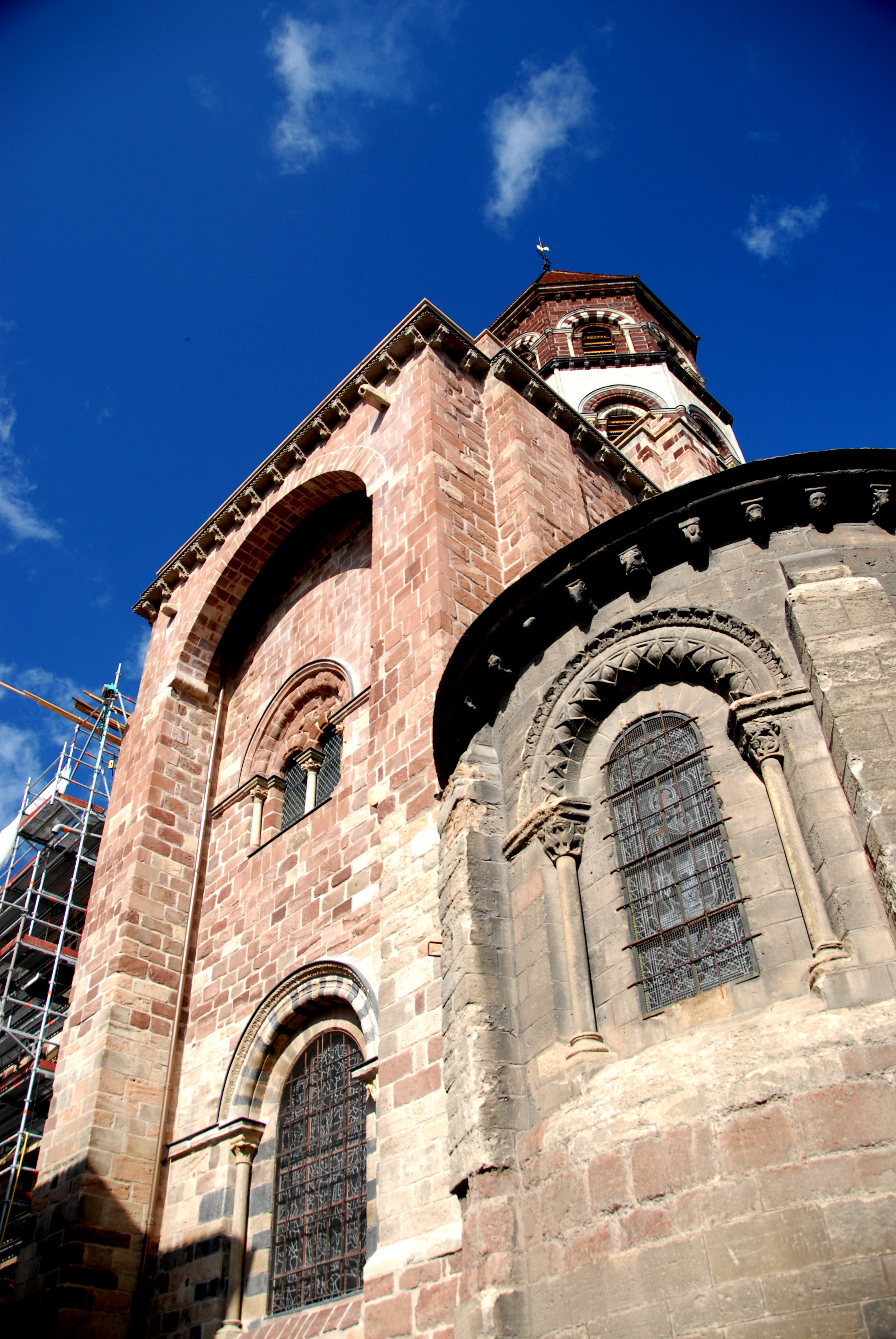 St.-Julien Brioude, Giebel SO-Querhausarm, Anschluss an Kranzkapelle